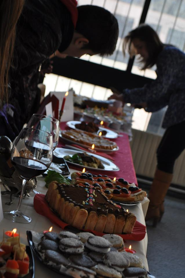 ᨅᨔ ᨕᨘᨁᨗ: Кулинарна изложба, Ден на франкофонията (2013)